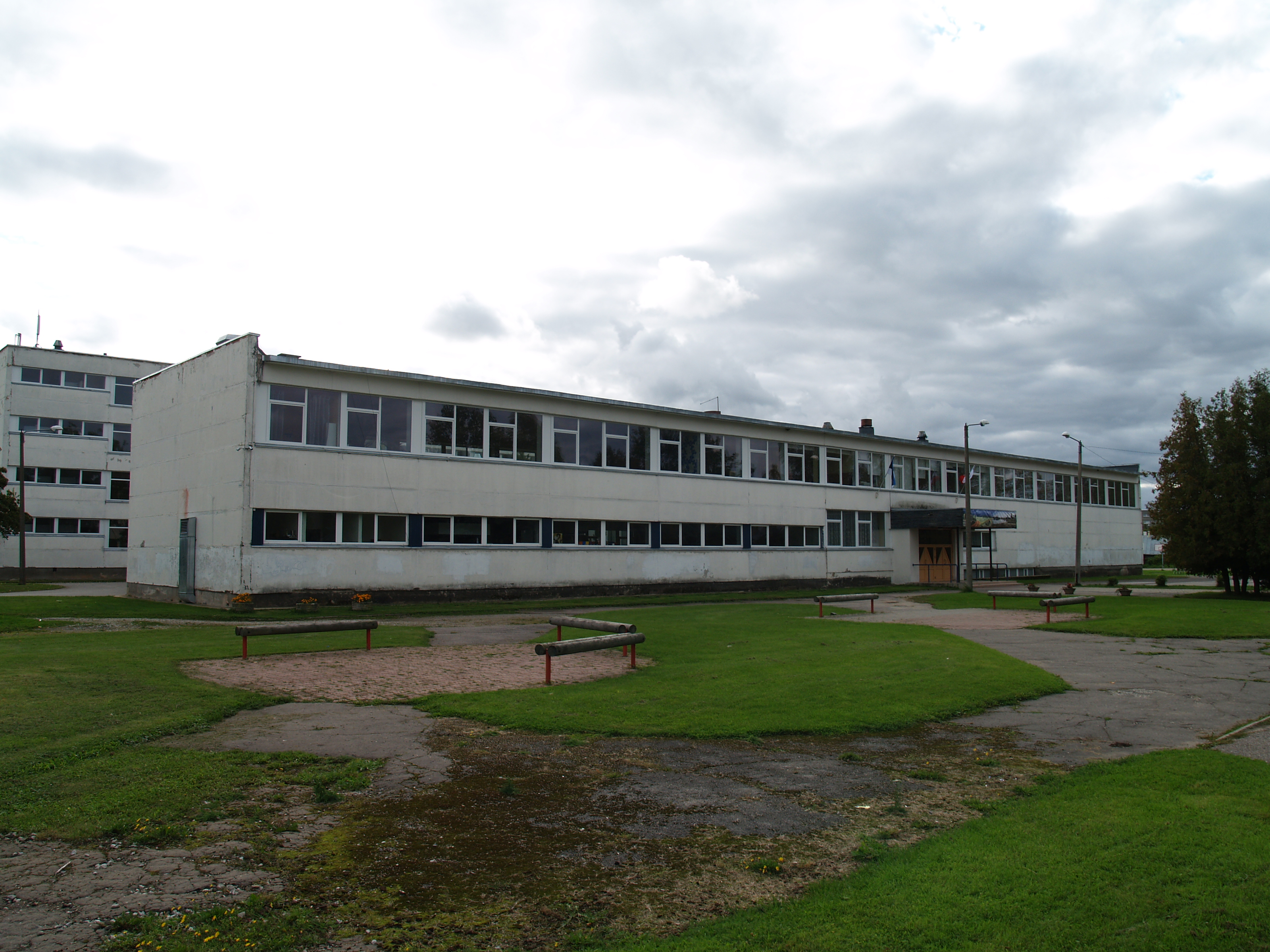 Tartu Kunstigümnaasium